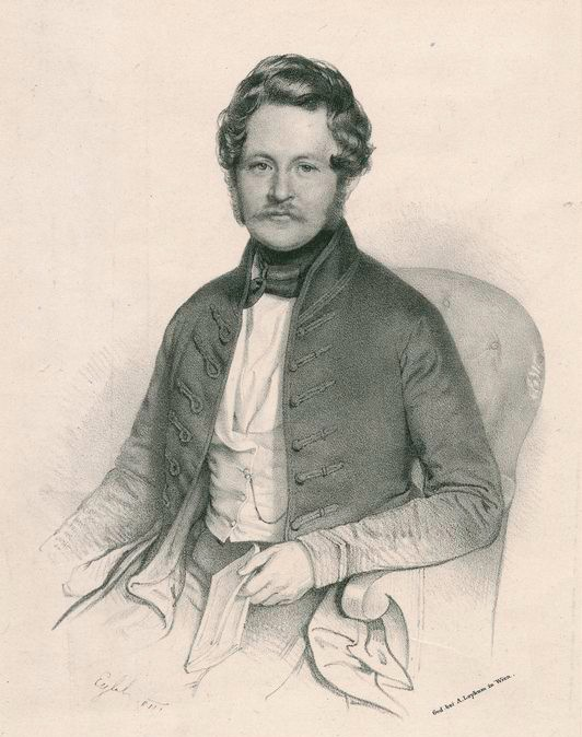 Jan Emanuel Doležálek (1780 - 1858), Český hudební skladatel.